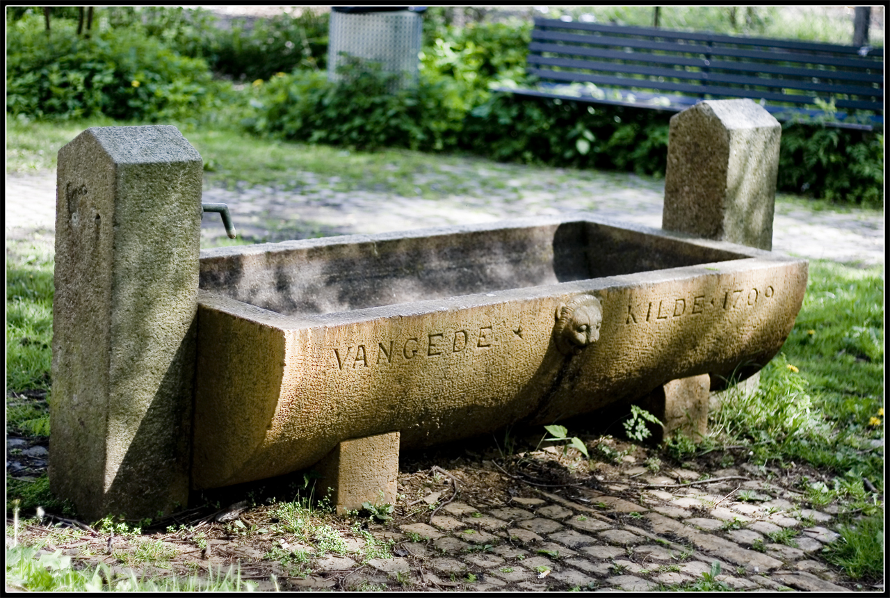 Vangede kilde i Brobæk mose i Vangede